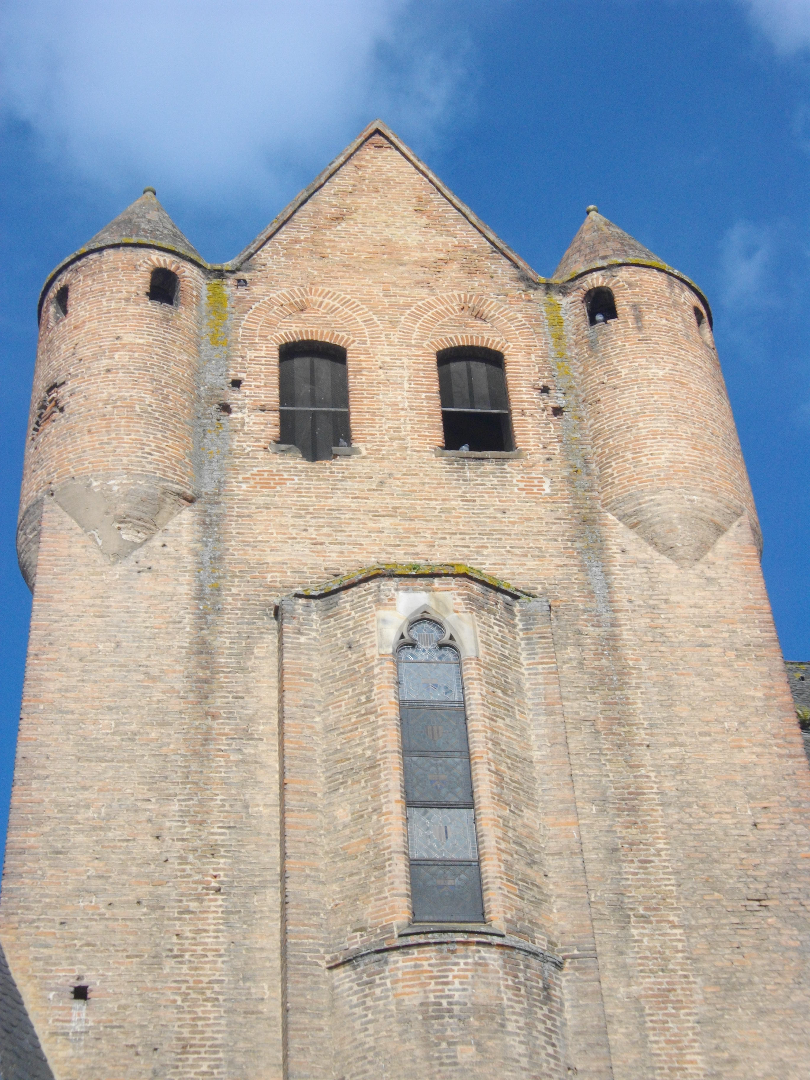 Vue extérieure de la grande baie de la chapelle épiscopale. La toiture est encadrée de deux échauguettes entre lesquelles des ouvertures ont été créées ultérieurement.